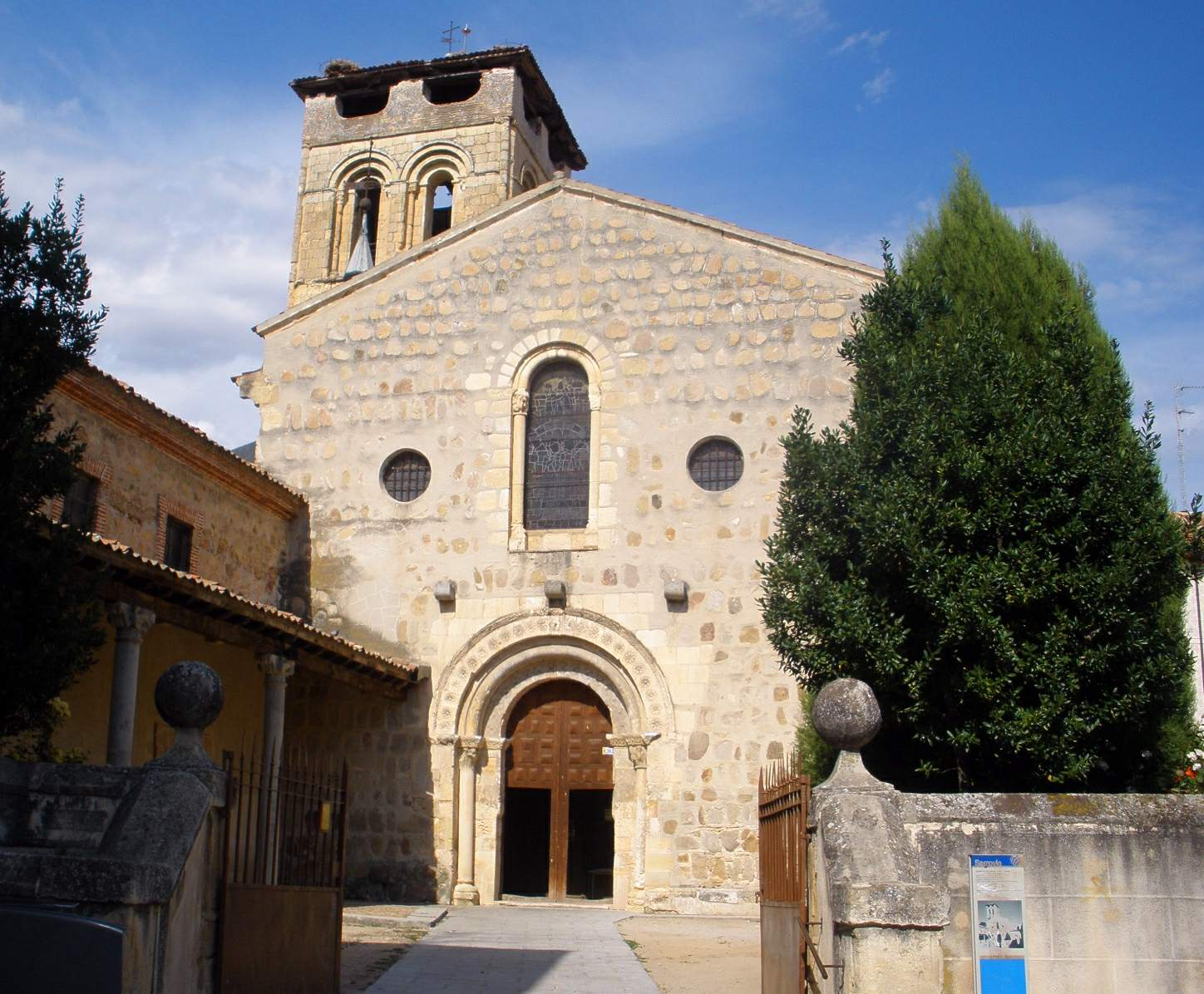 iglesia de San Justo, Segovia